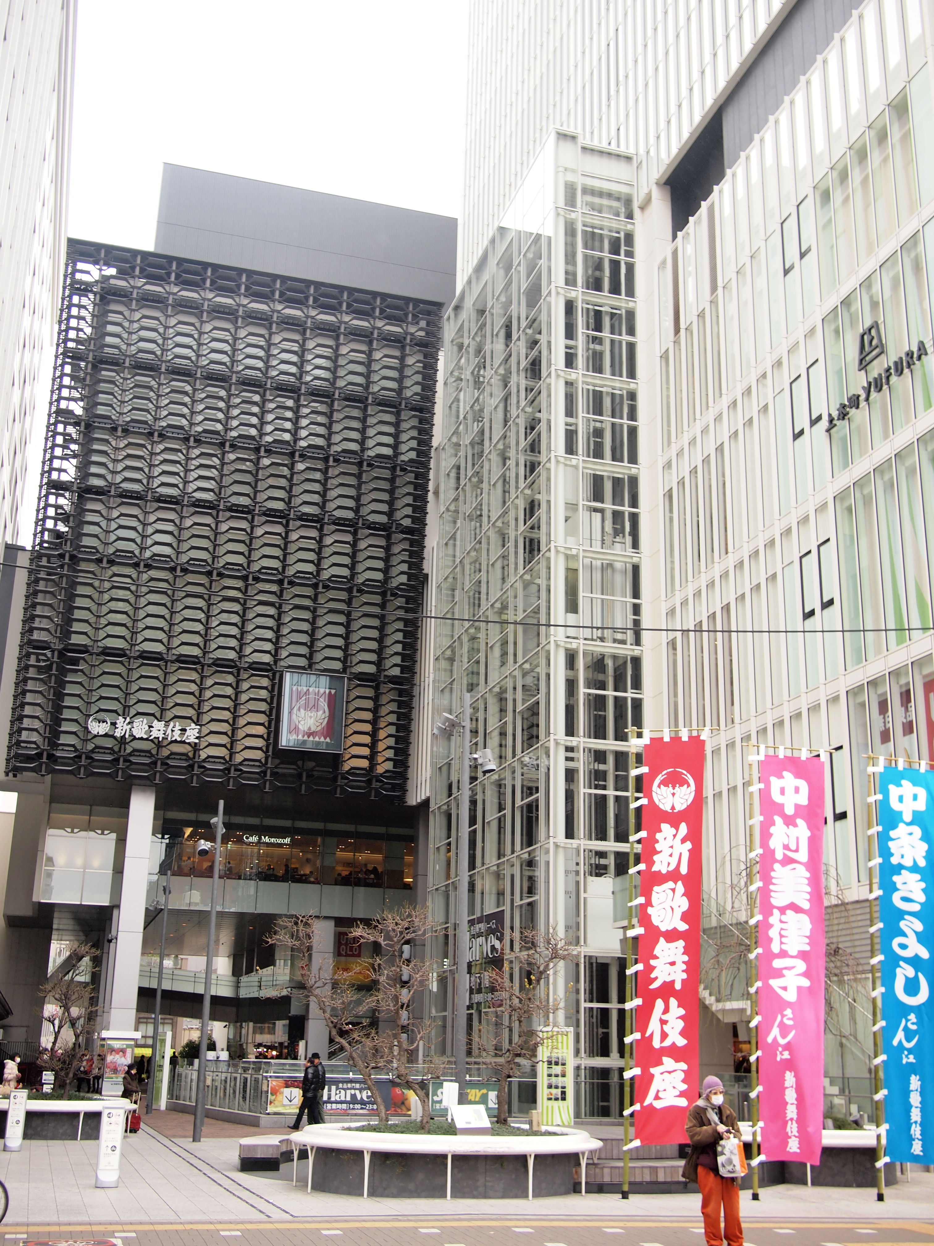 中村美律子 中条きよし